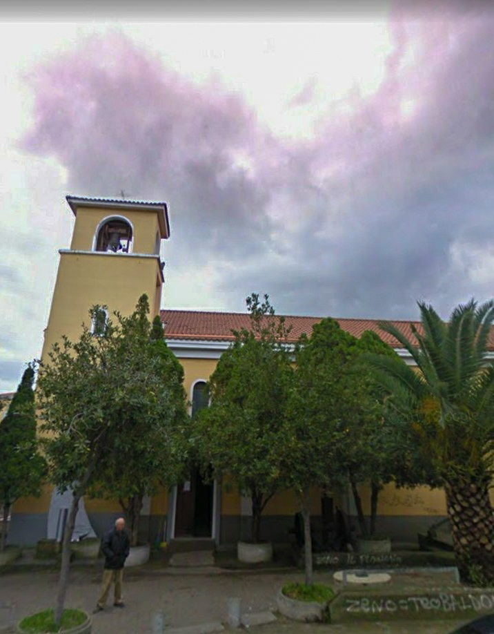 Chiesa di Santa Maria degli Zarapoti (Catanzaro)